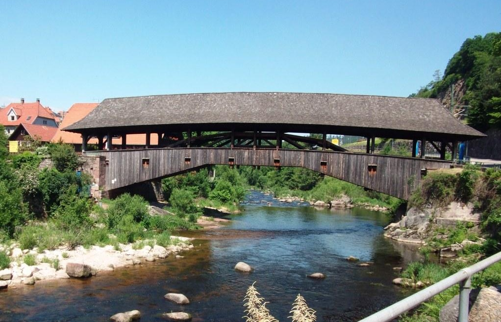 Holzbrücke in Forbach nach altem Vorbild errichtet